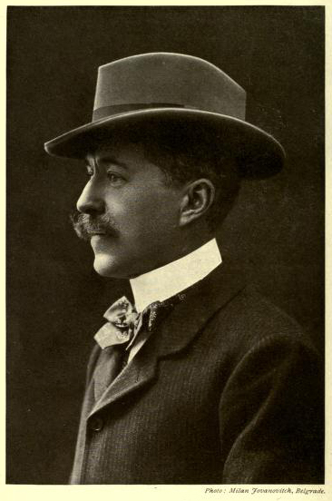 Фотографија из књиге „Through Savage Europe“, 1907.